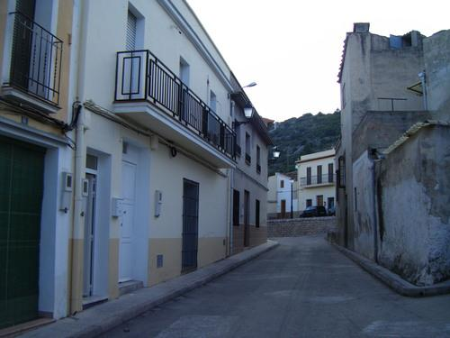 Vista de la calle Joaquín Ballester Llorens en Tormos, a la derecha se sitúa su casa natal (hoy dos casas).